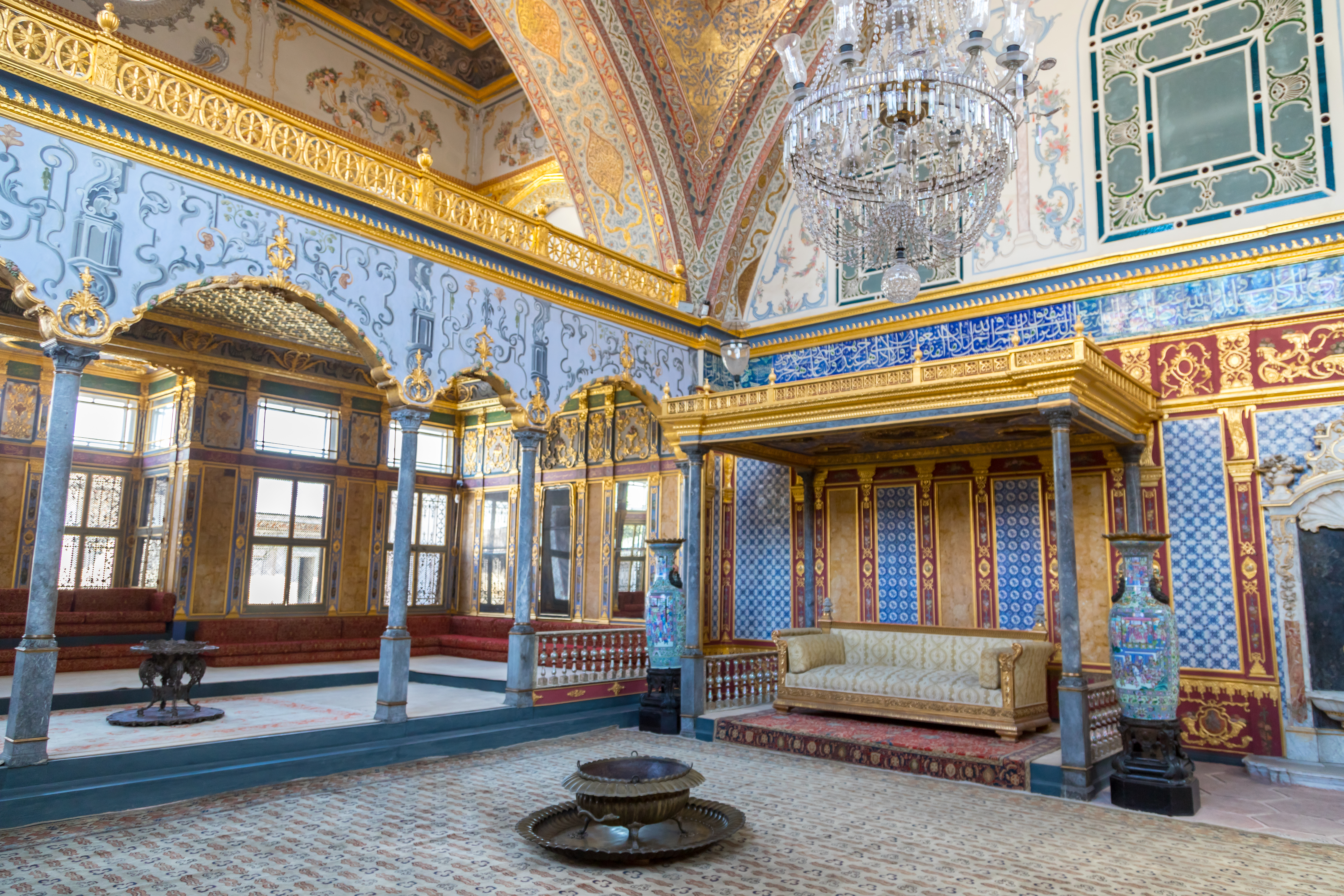 una delle sale